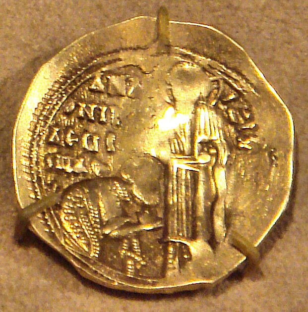 Andronikos II Palaiologos Gold Hyperpyron